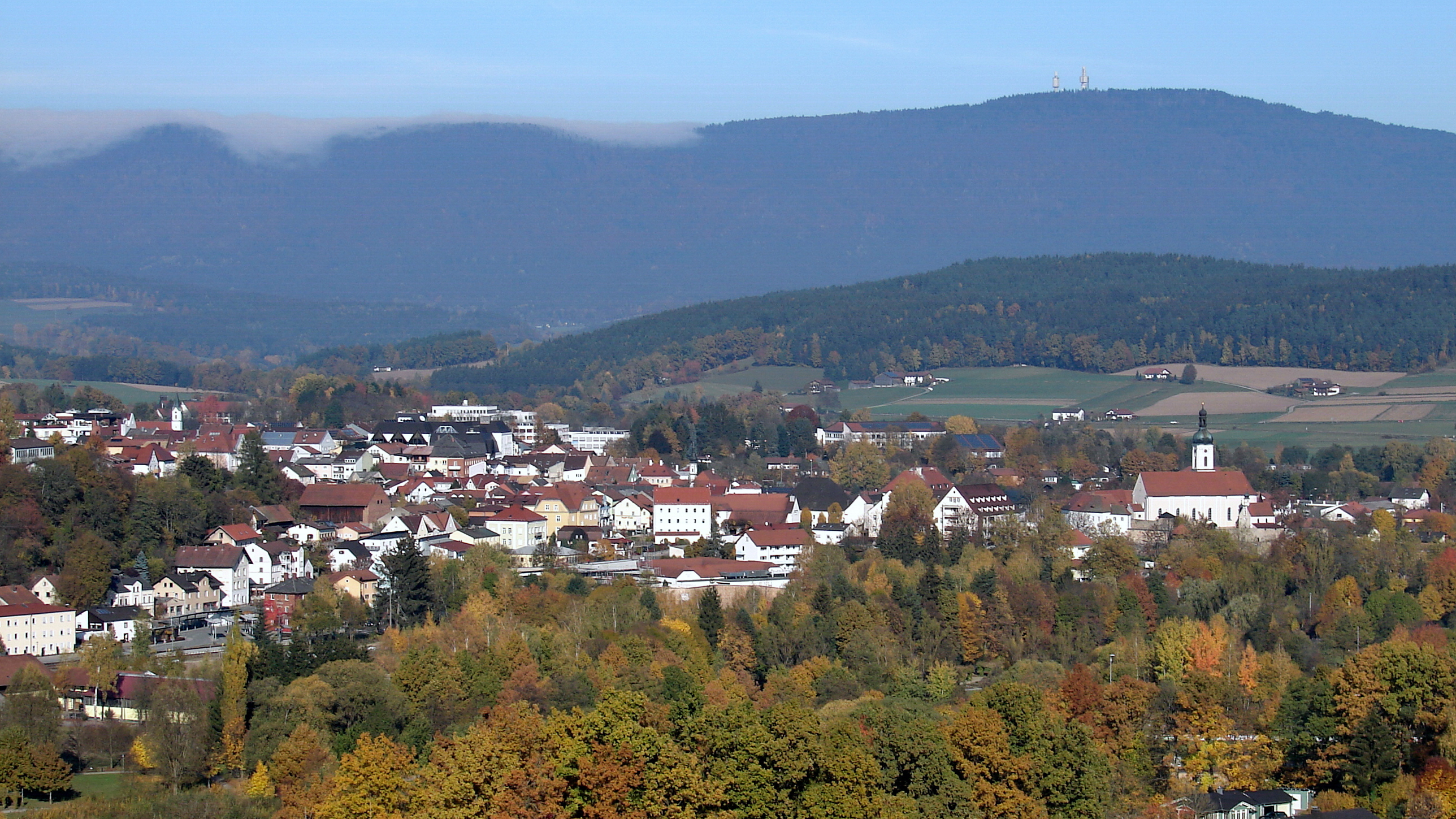 Bad Kötzting (bis 2005: Kötzting) ist eine Stadt im Oberpfälzer Landkreis Cham in Ostbayern und seit Dezember 2005 staatlich anerkanntes Kneippheilbad.